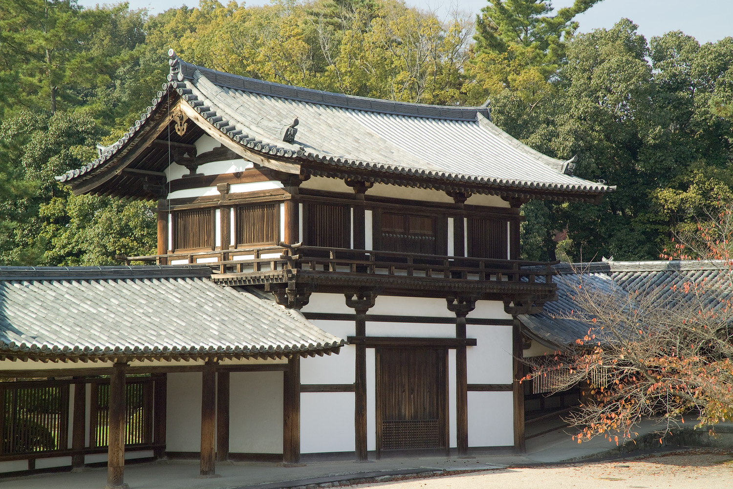 Hōryū-ji 法隆寺 Ikaruga Nara Prefecture Japan 奈良県生駒郡斑鳩町